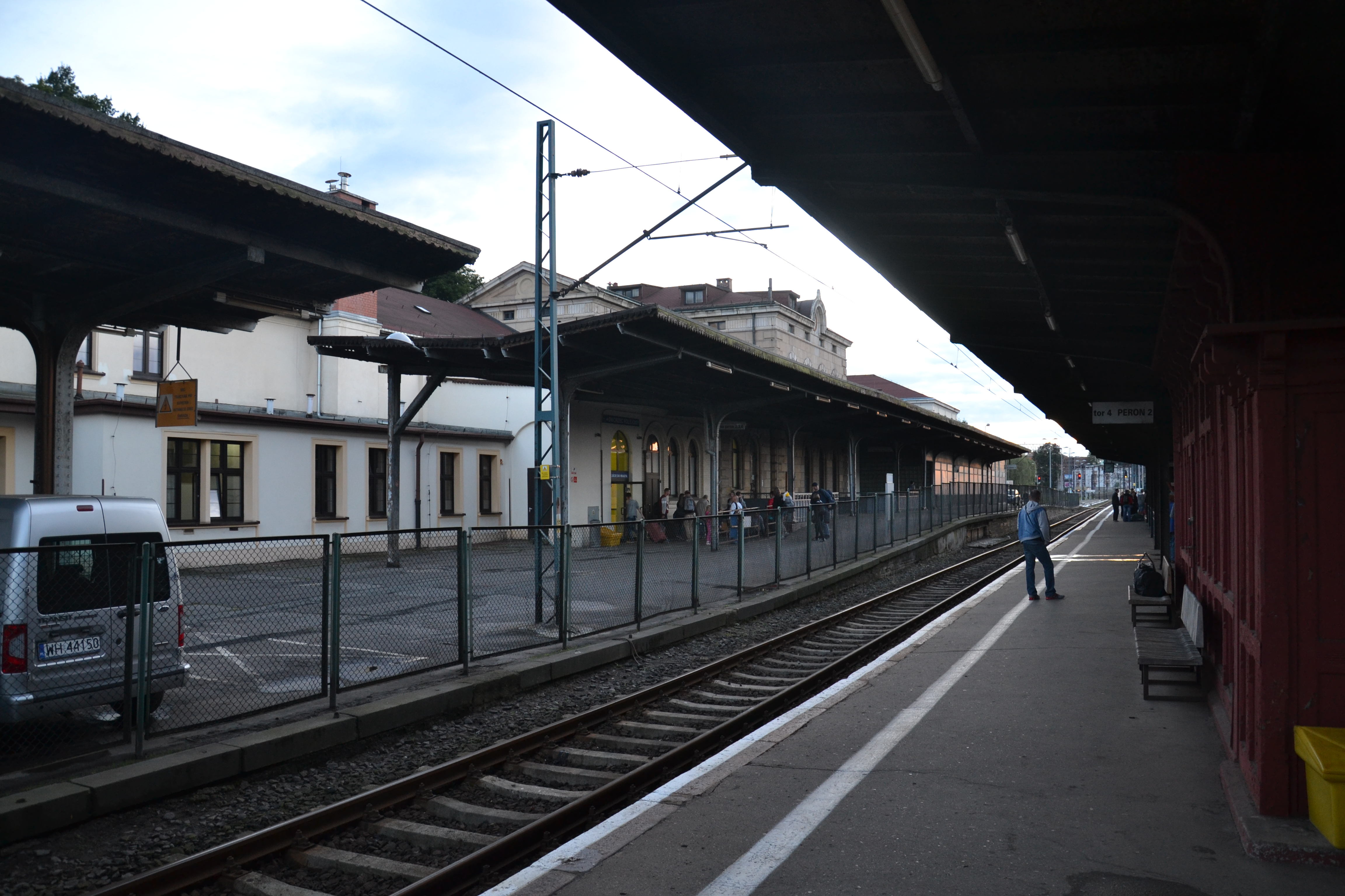 Perony dworca Jelenia Góra